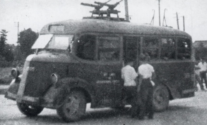 バス車体に散水電車のモーターを搭載した小型トロリーバス